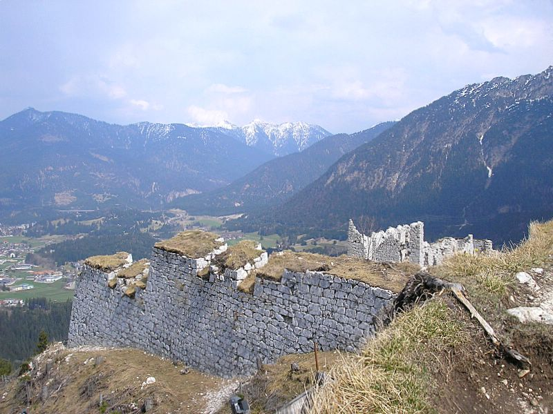 Festung Schlosskopf bei Reutte (Tirol). Nordseite gegen die Ammergauer Alpen. Rechts die Ruine der Kaserne.